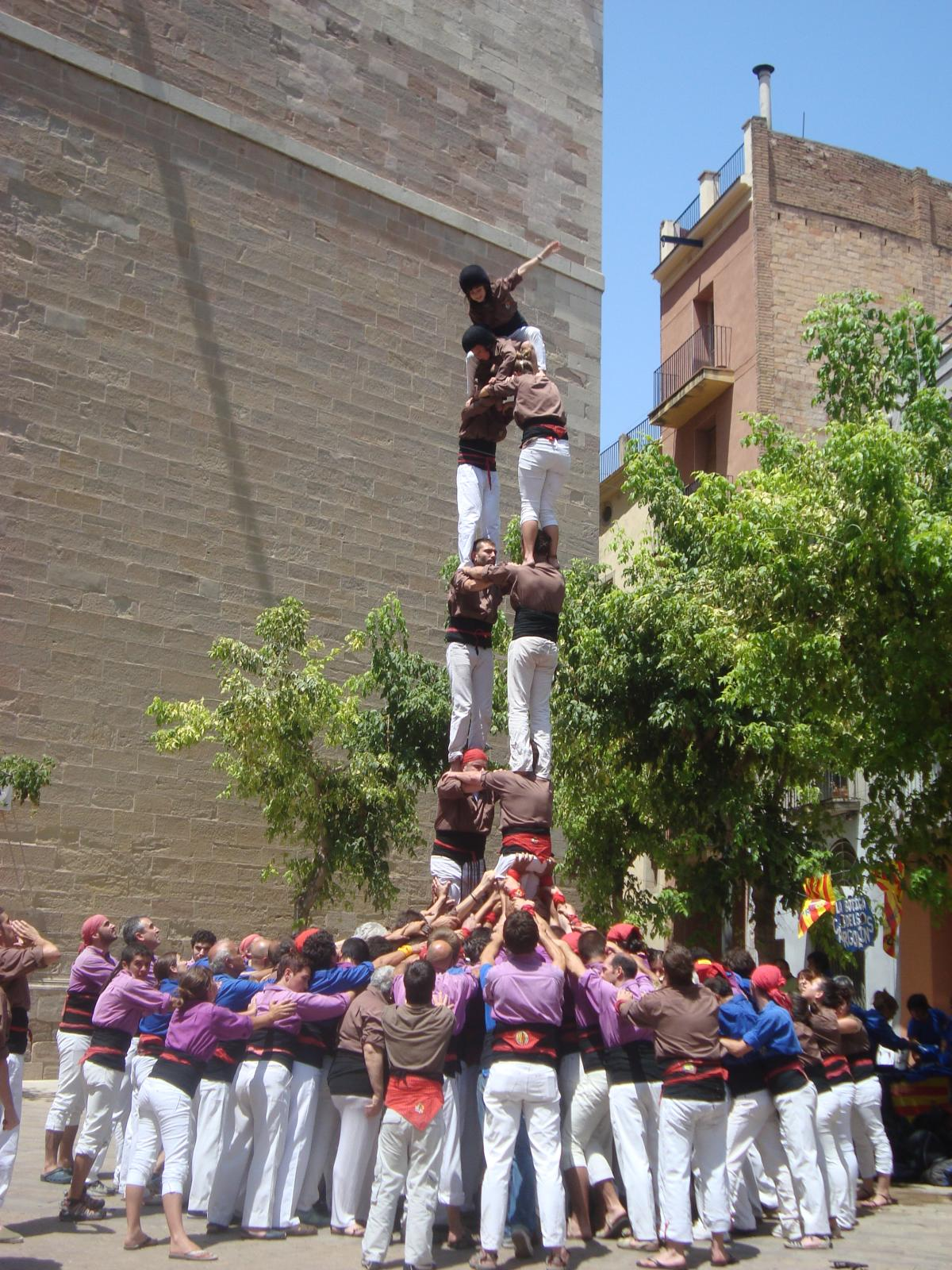 2 de 6 dels Margeners de Guissona. Data 2011-07-10 . Lloc: Igualada- Plaça Pius XII. Motiu: Actuació Aniversari Cal Tabola.